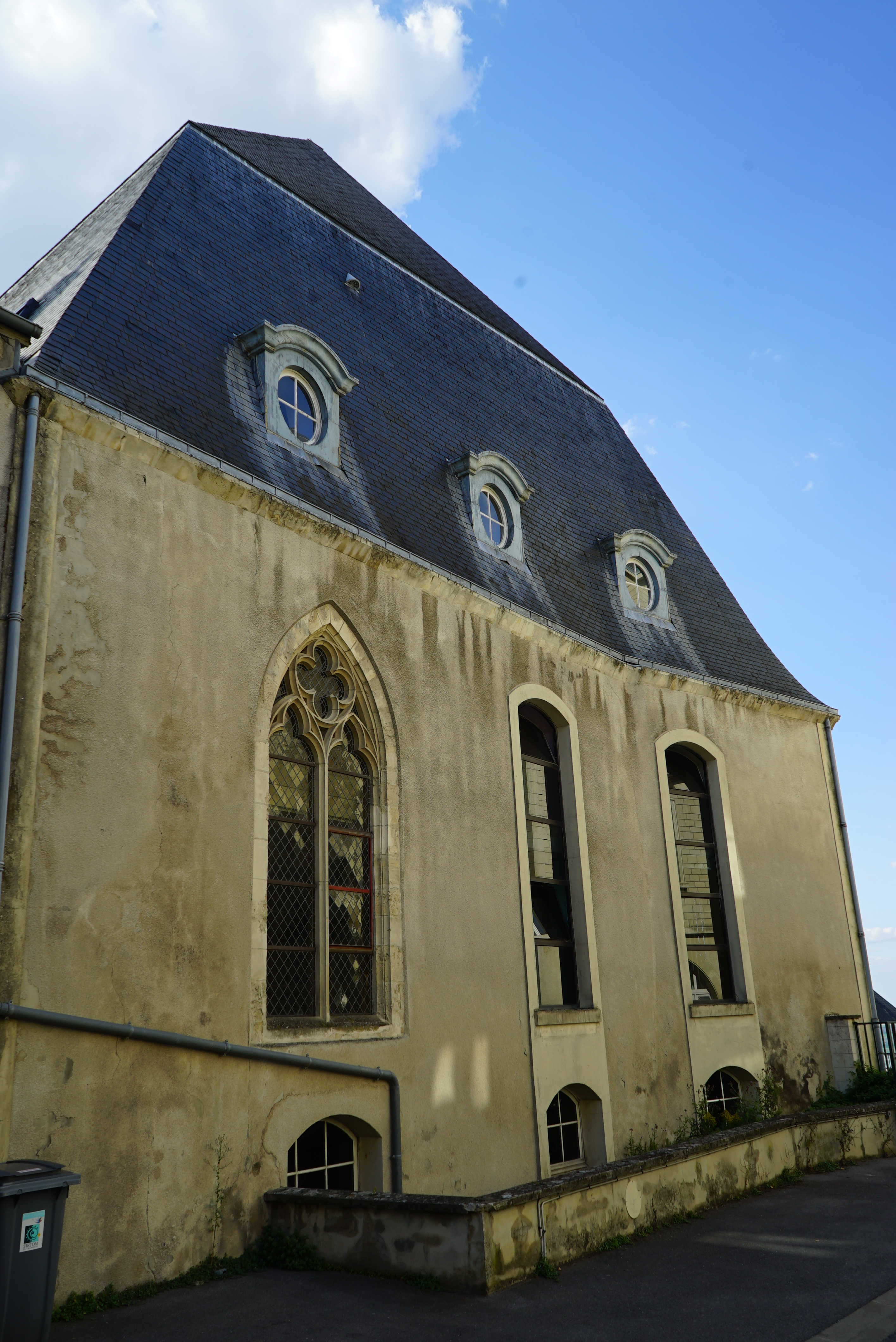 une vue du bâtiment arrière de l'Ancienne église Saint-Remy-au-Velours à Laon.